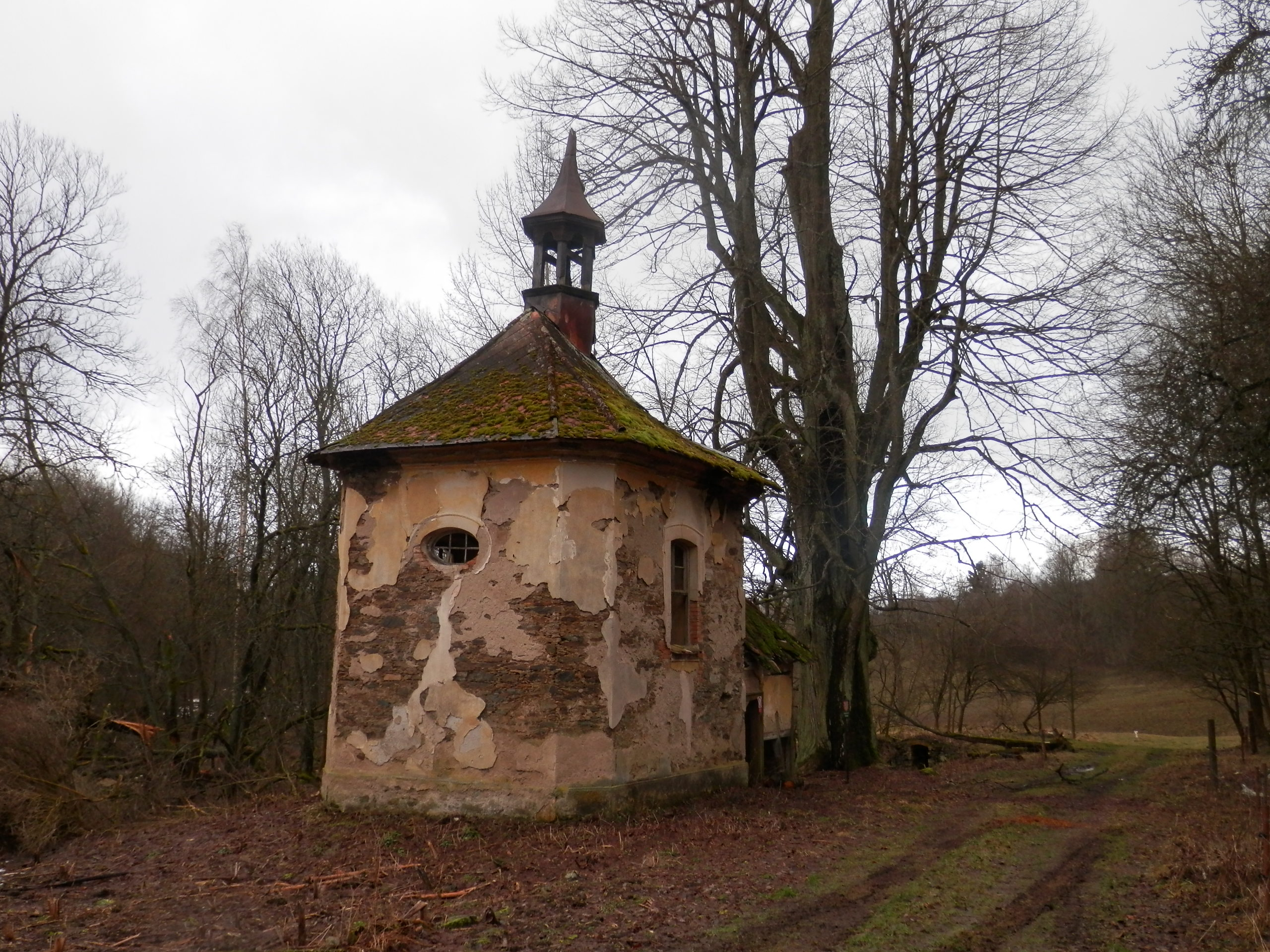 Výškovice kaple